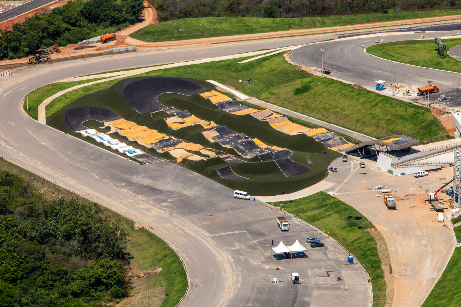 Centro Olímpico de Ciclismo BMX.